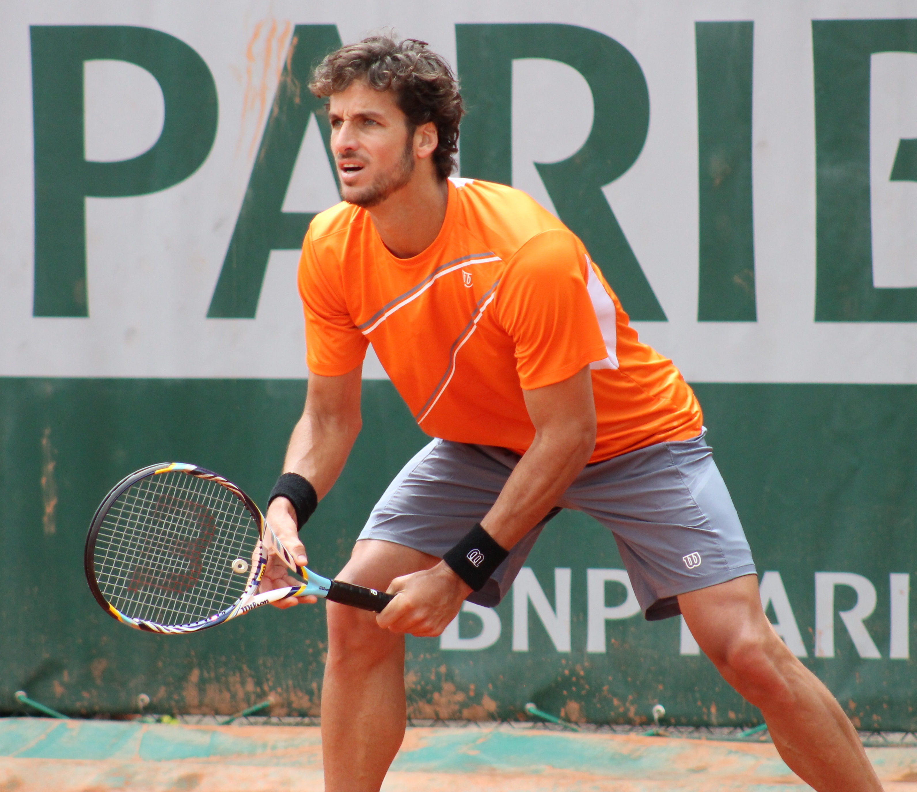 Lopez F. RG13 (4)